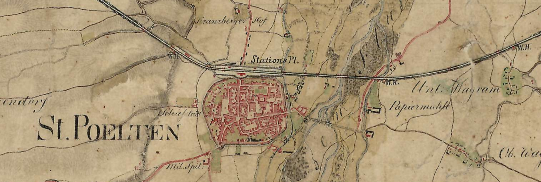 St. Pölten auf einer Karte der Franziszeischen Landesaufnahme